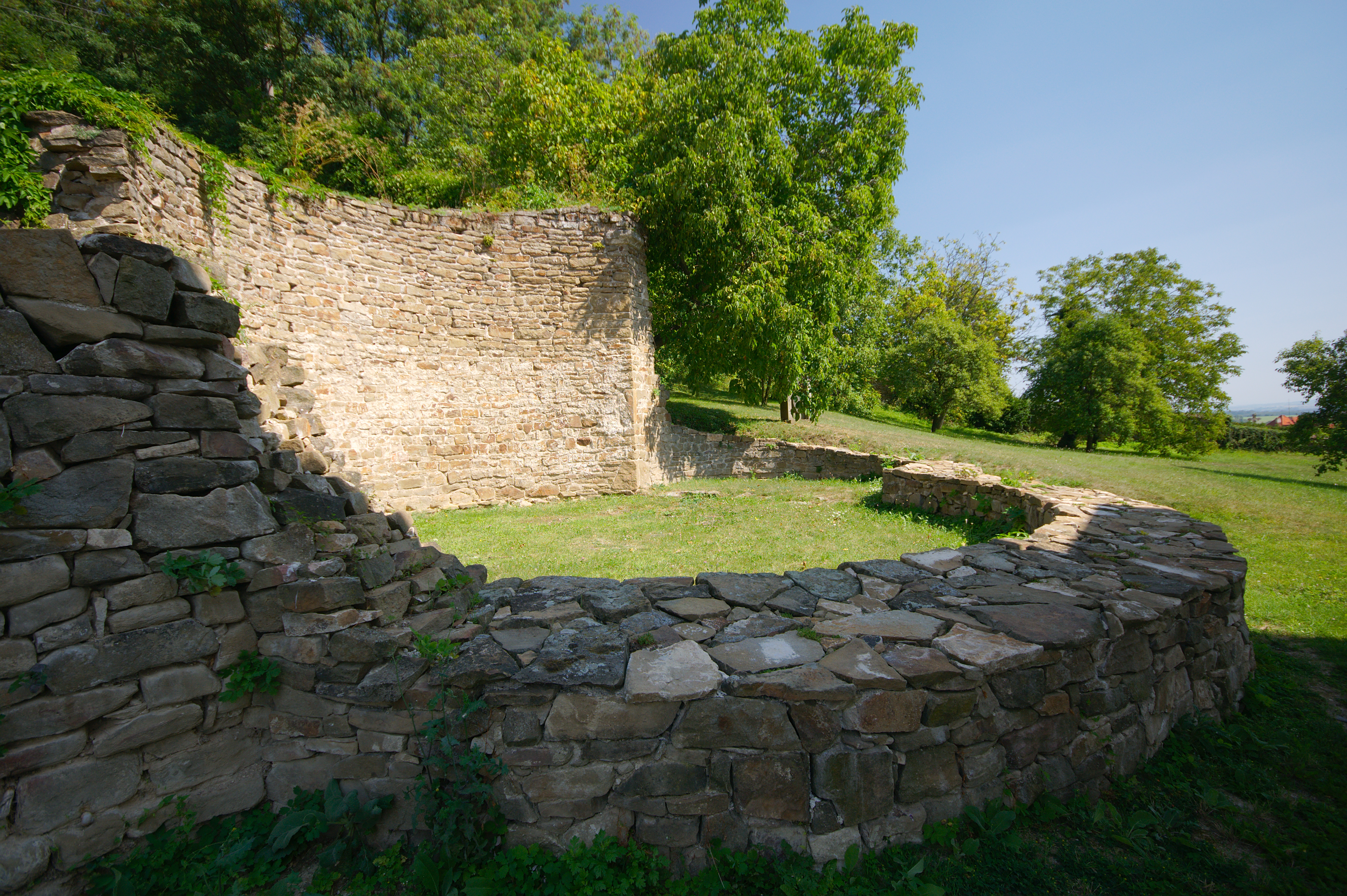 Rotunda svatého Pantaleona, Pustiměř, okres Vyškov